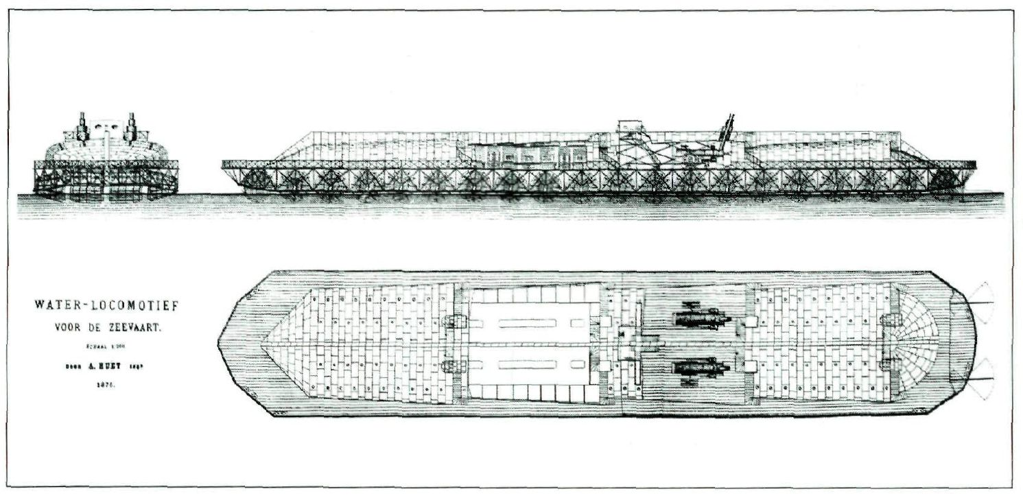 Ontwerp voor een Water-locomotief voor de Zeevaart door Adrien Huet, 1876